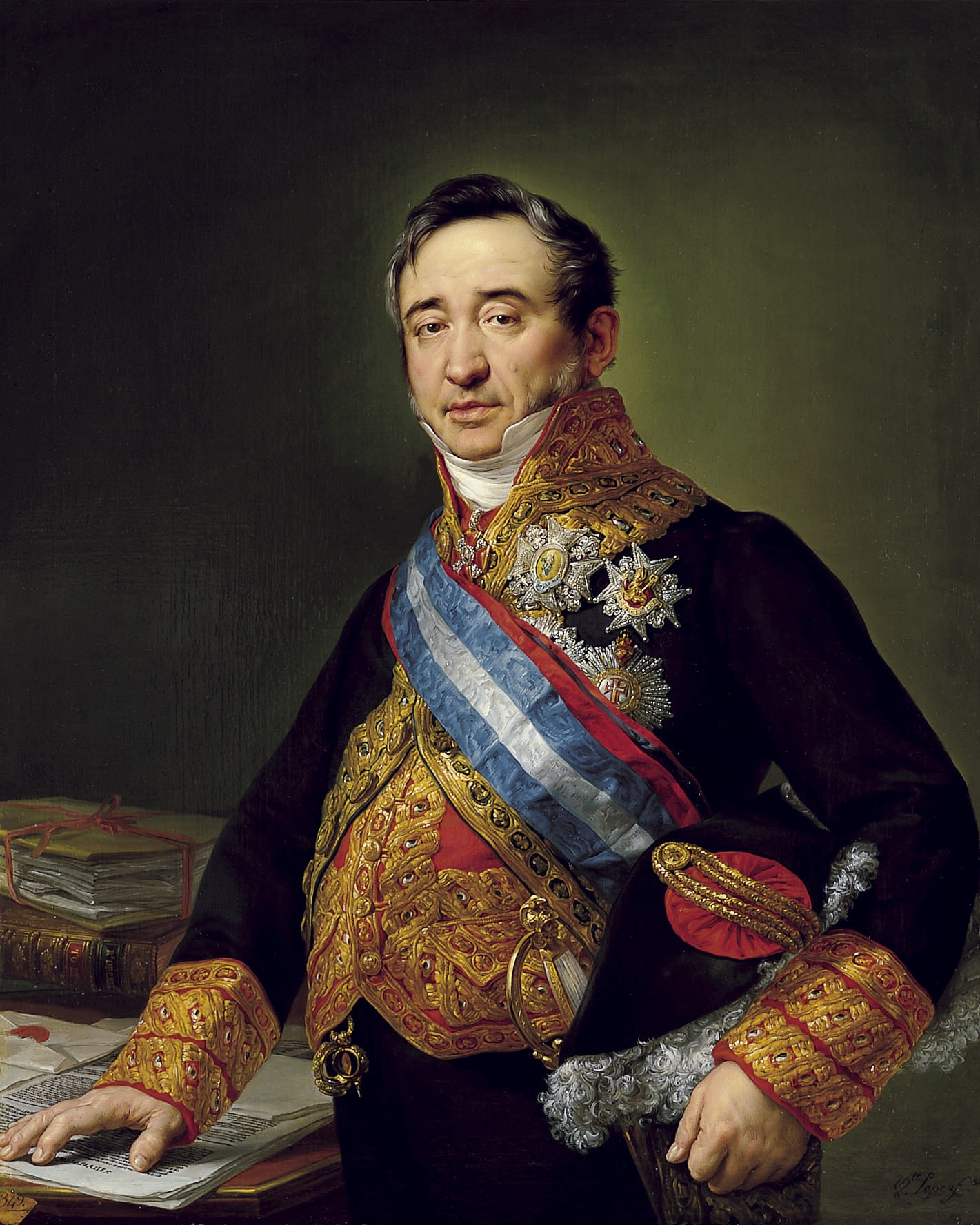 Retrato del politico español Manuel González Salmón (1778-1832), que fue secretario de Estado del rey Carlos IV de España en la corte de San Petersburgo y ministro de Estado en 1819 y posteriormente desde 1826 hasta su muerte. Y según algunos autores el retrato debió ser realizado hacia 1826, ya que el retratado aparenta tener unos cuarenta y ocho años de edad y luce la gran cruz y la banda de la Orden de Carlos III, así como las insignias de la Orden de Cristo, del reino de Portugal, la de la Orden de San Jenaro, del reino de Nápoles, y la cruz de la Orden de Santa Ana, otorgada en el Imperio ruso. Y el cuadro fue donado en 1844 a la Real Academia de Bellas Artes de San Fernando por la viuda de Manuel González Salmón, María Pilar Onís.